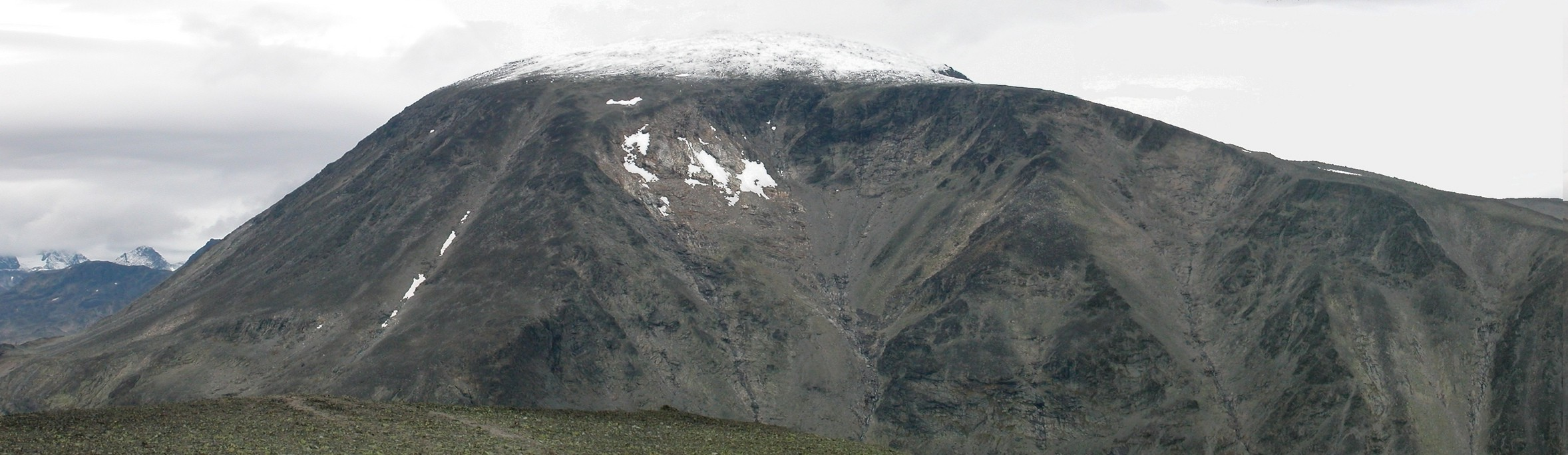 Own work. August 2005. Besshø seen from Veslfjellet, along Besseggen hiking trail.